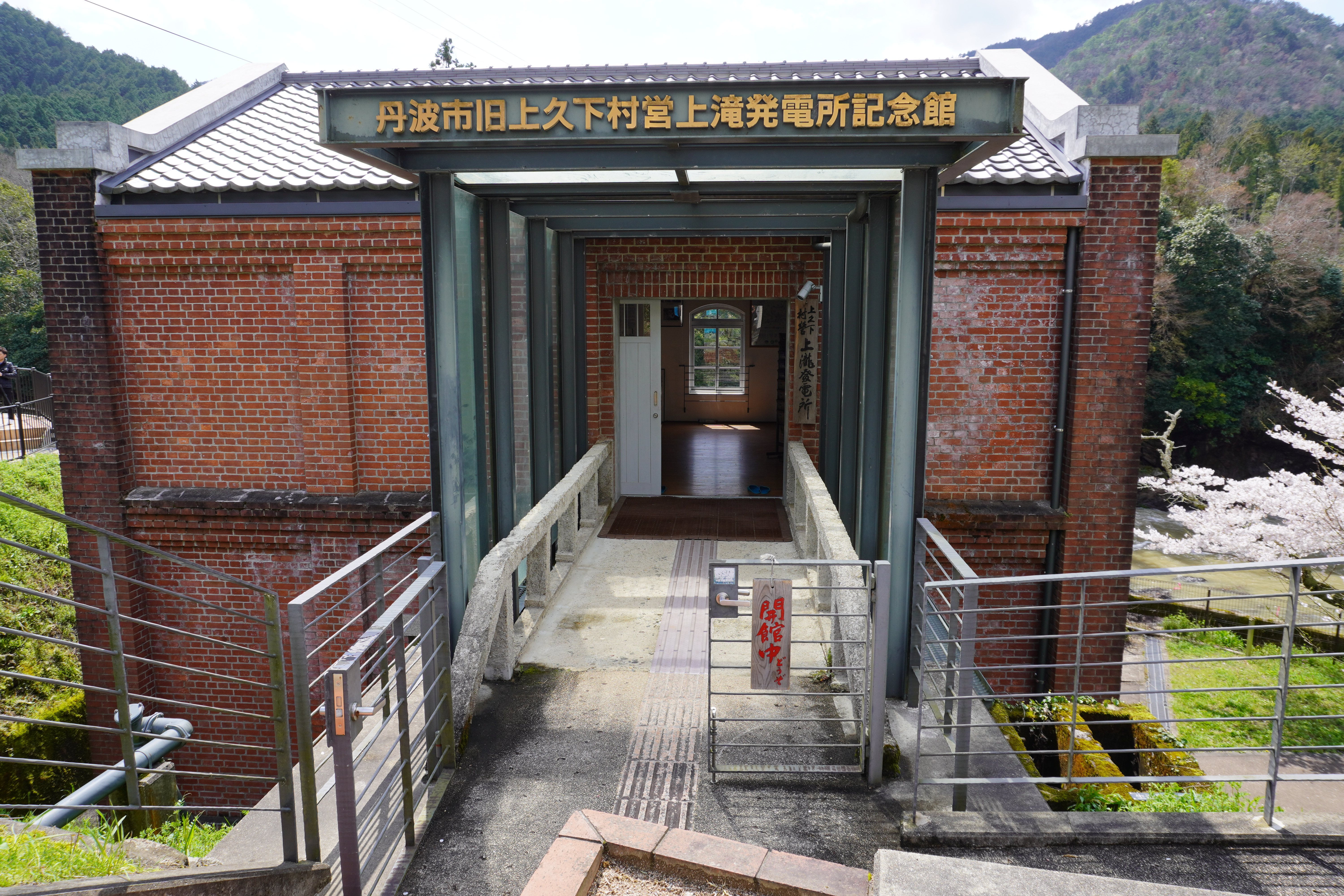 旧上久下村営上滝発電所記念館